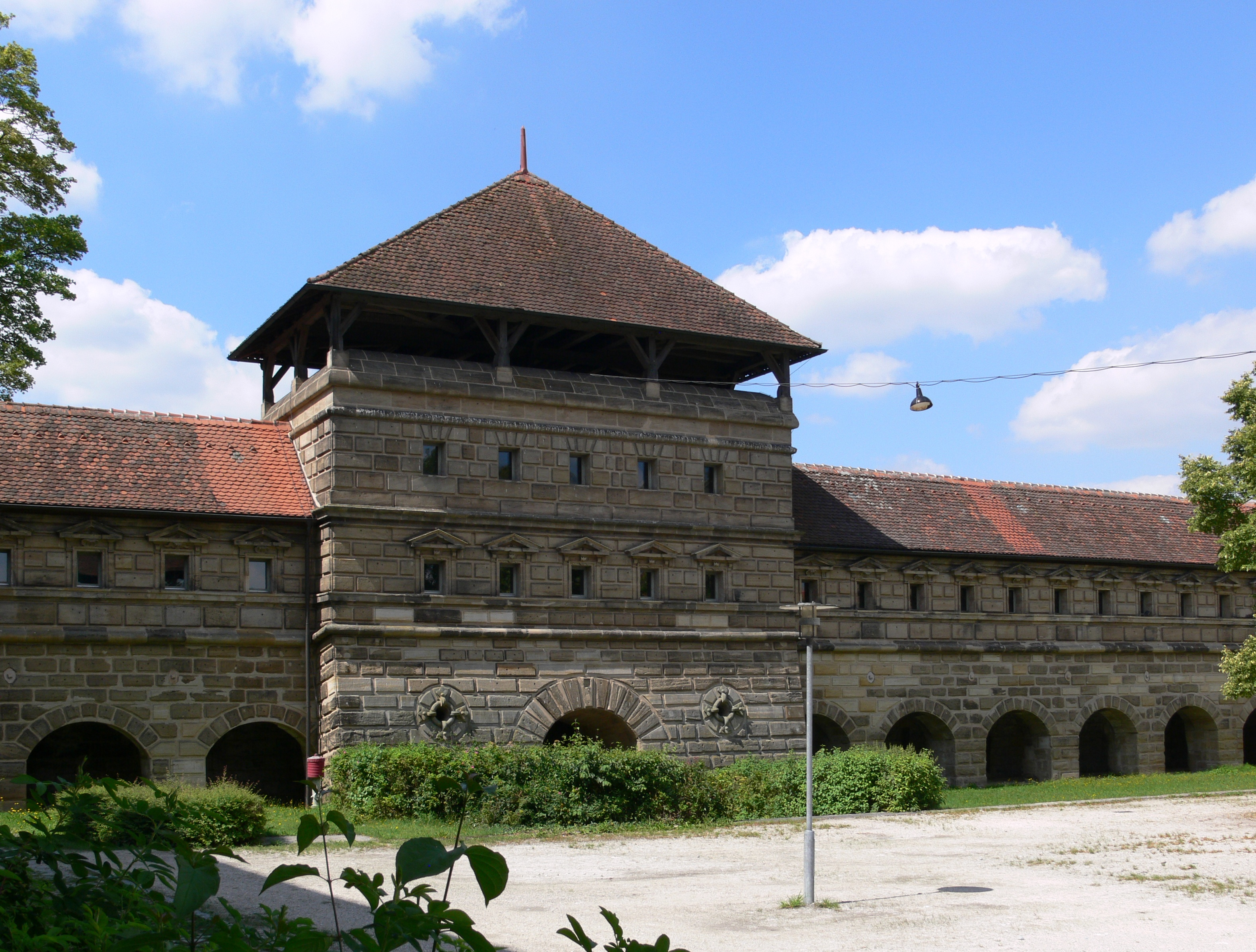 Festung Lichtenau, Lichtenau (Mittelfranken), Landkreis Ansbach Hof